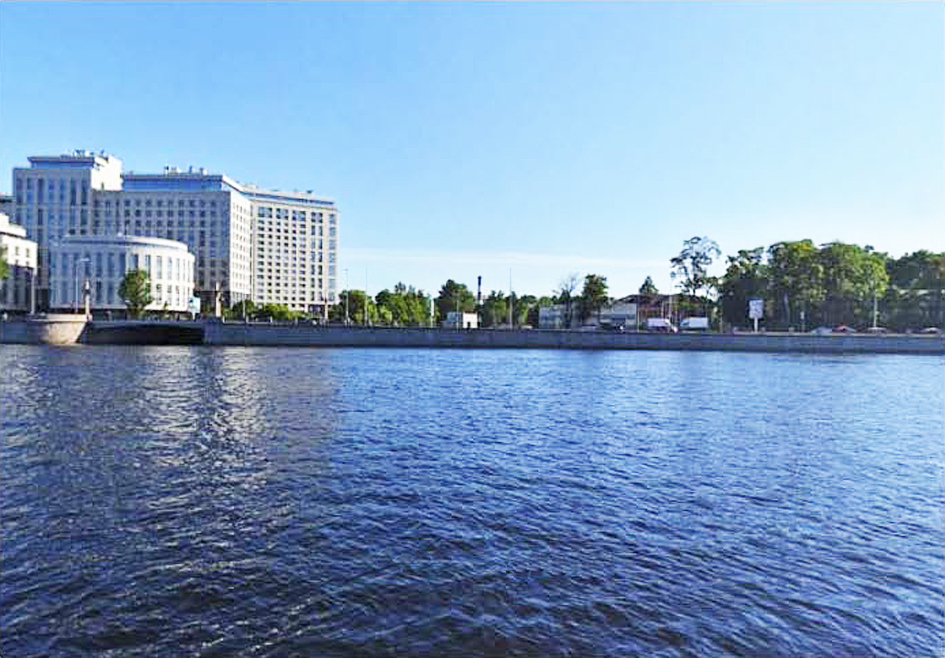 Санкт-Петербург. Элитный жилой комплекс в устье Черной речки на территории бывшей дачи Стогановых, где вначале 20 века располагался «Русско-Балтийский воздухоплавательный завод» («Авиа-Балт»), в советское время получивший название «Красный лётчик».